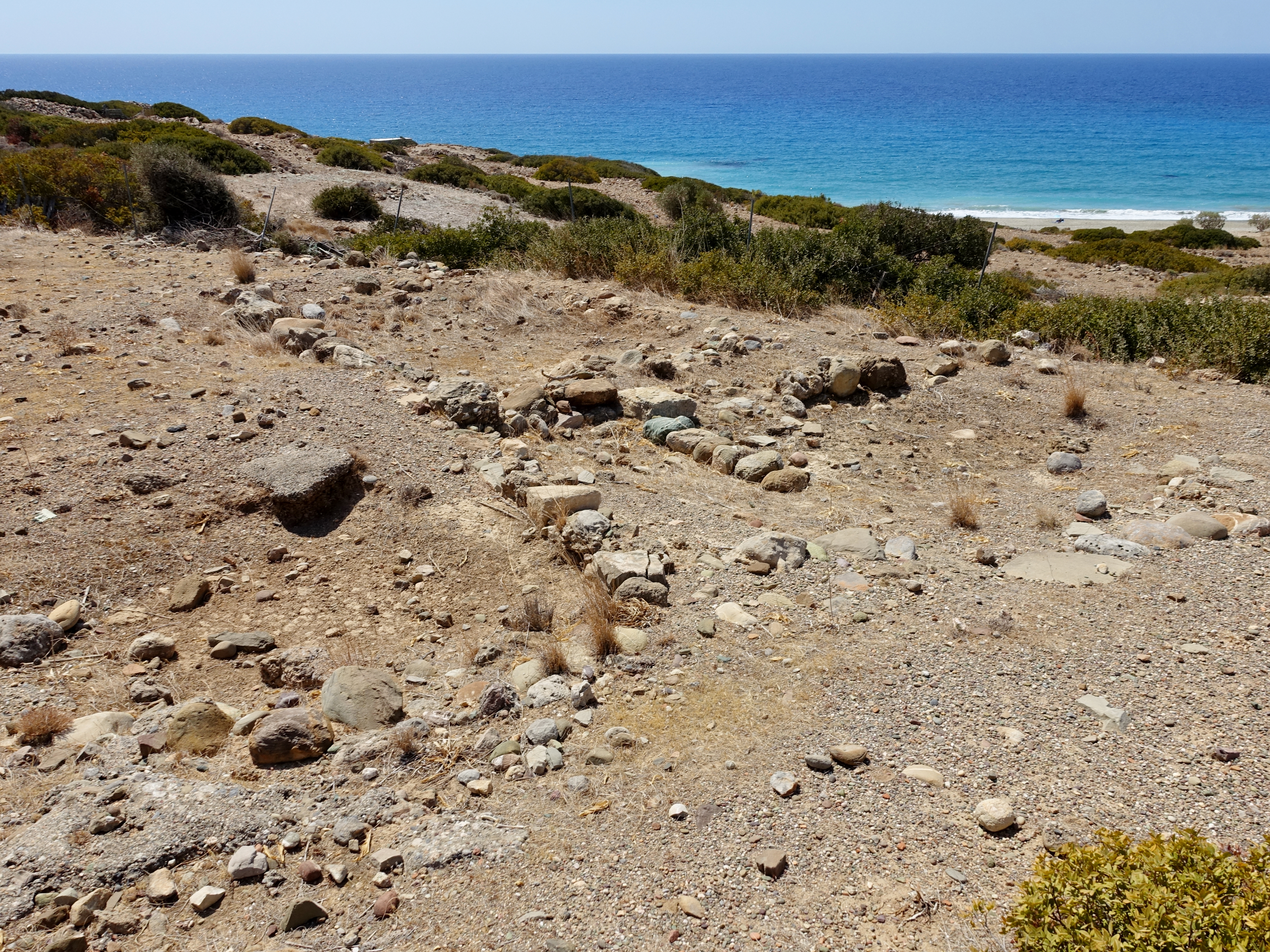 Hügel Vigla (Βίγλα ‚Wache‘) hinter dem Strand von Diaskari (Παραλία Διασκάρι), Gemeinde Sitia, Kreta, Griechenland